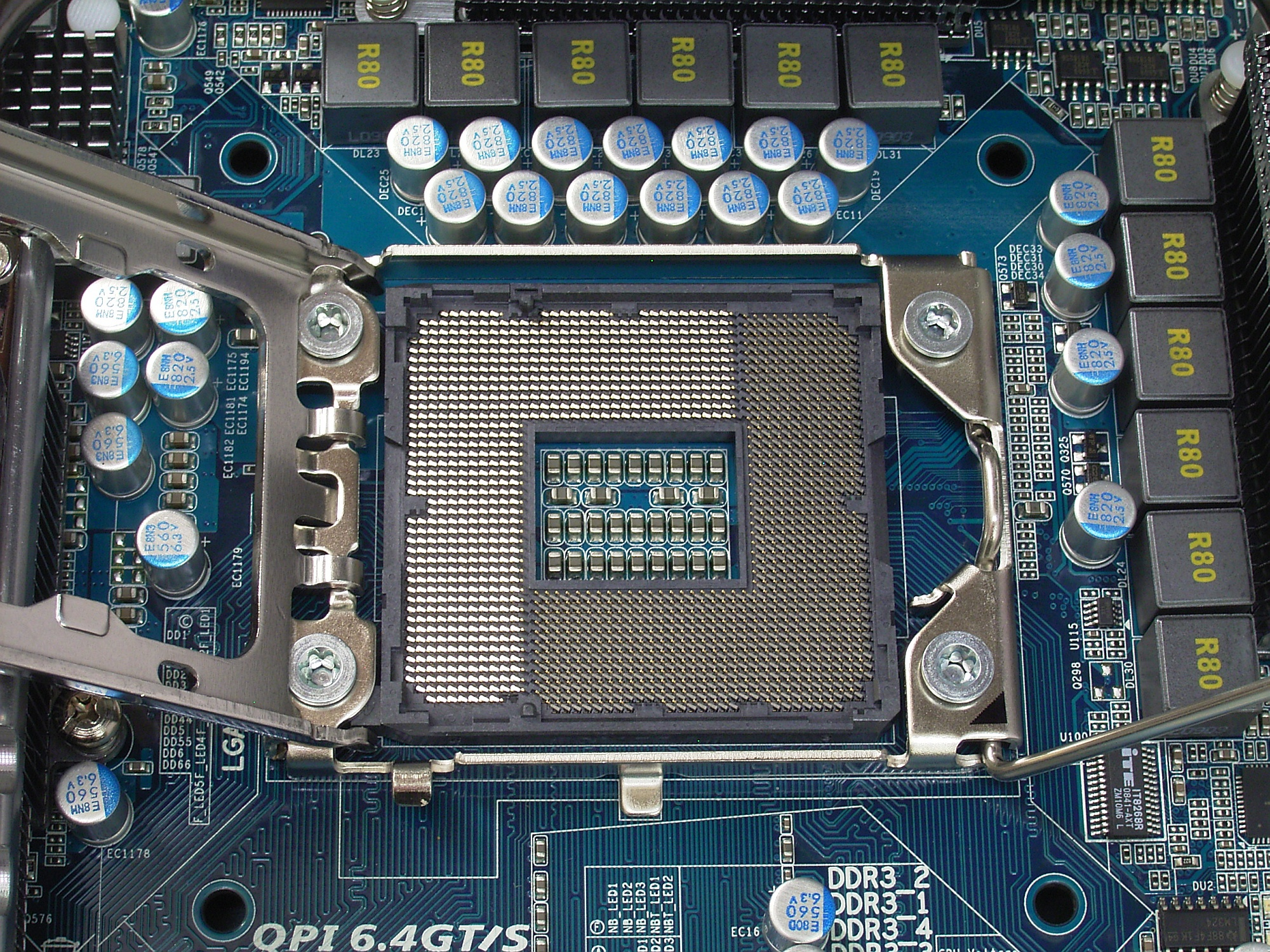 Socket LGA 1366, ohne Schutzabdeckung, Halterung geöffnet